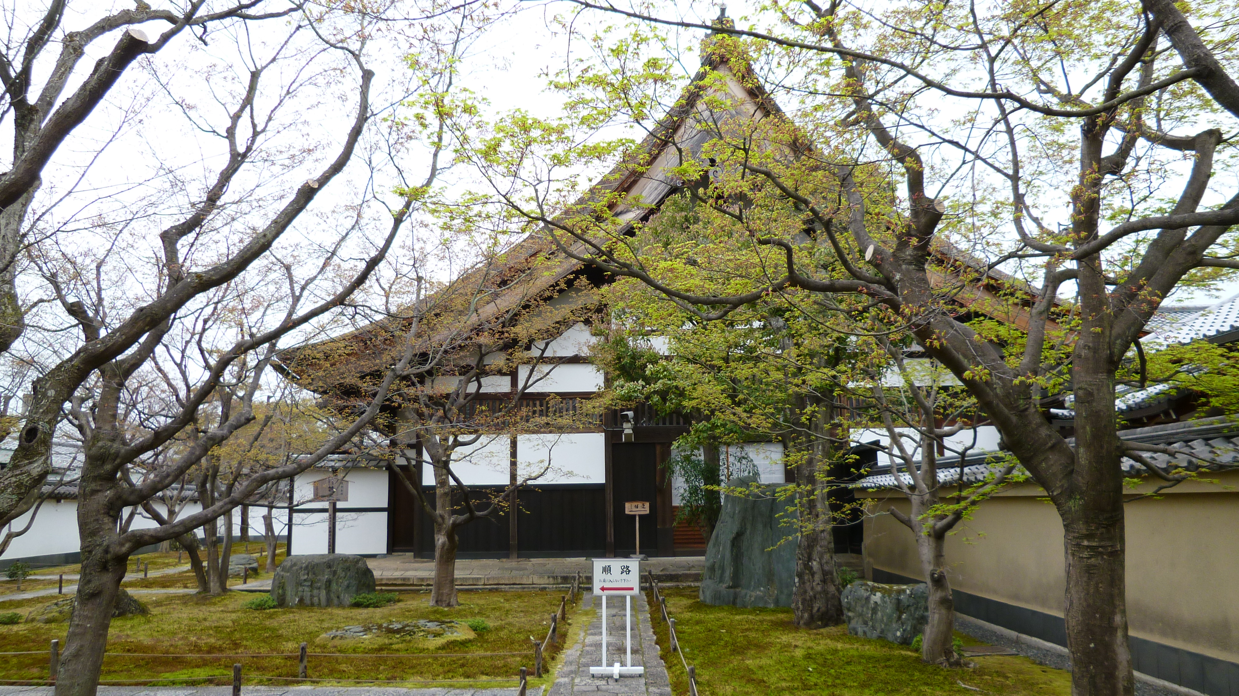 大徳寺塔頭・黄梅院庫裏（国重文）、2012年4月撮影（特別拝観）